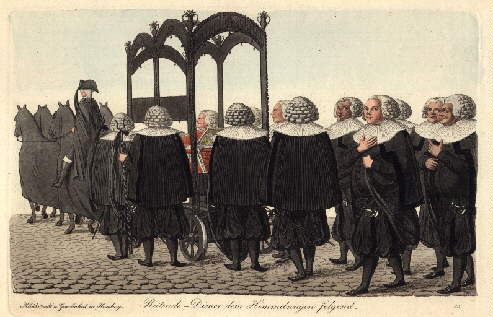 Reitende Diener dem Himmelwagen folgend, kolorierte Aquatinta-Radierung, 17,2 x 26,3 cm Das Bild zeigt ein Hamburger Leichenbegängnis